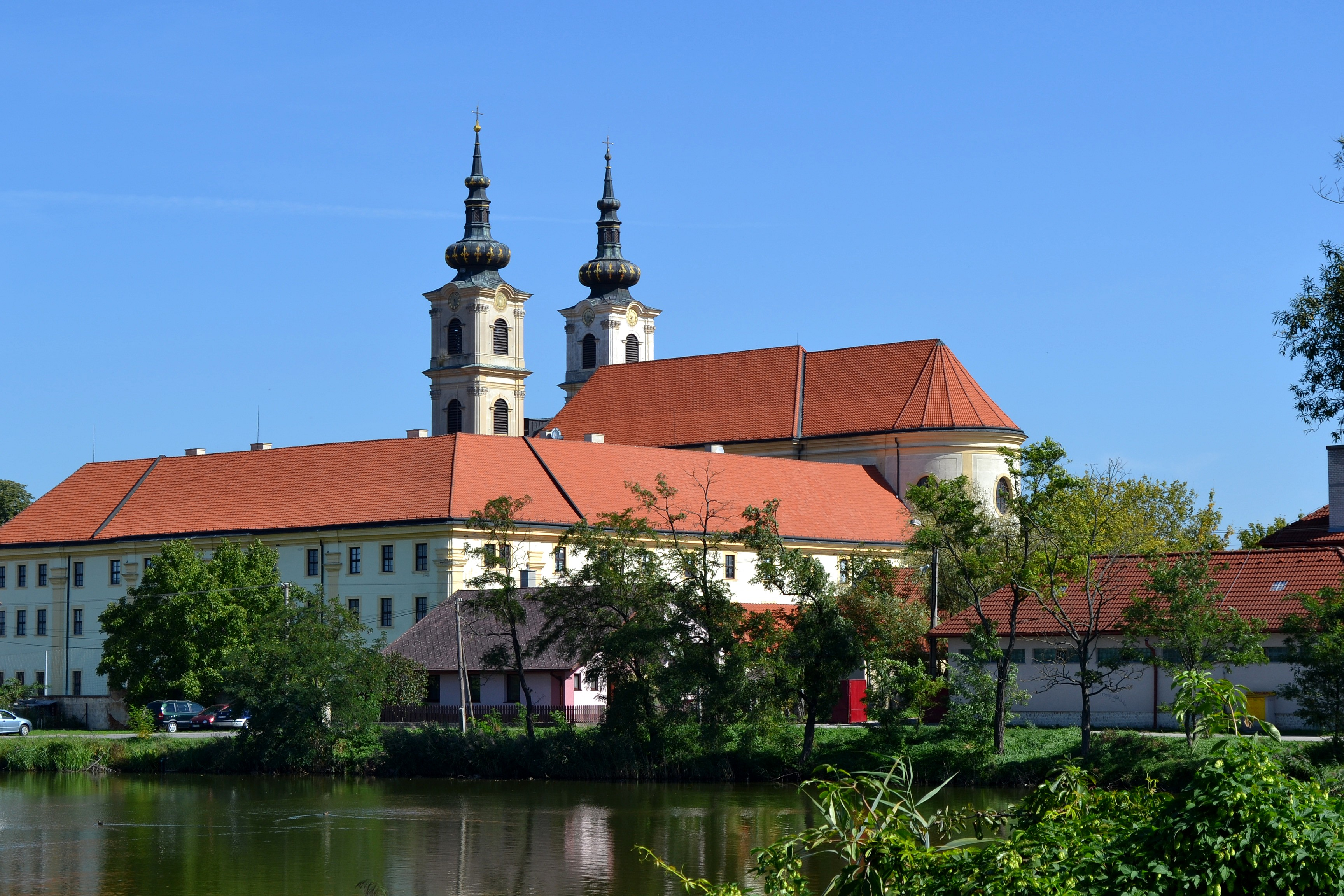 Šaštín-Stráže (okr. Senica), Bazilika Sedembolestnej Panny Márie; celkový pohľad na baziliku s kláštorom od juhozápadu